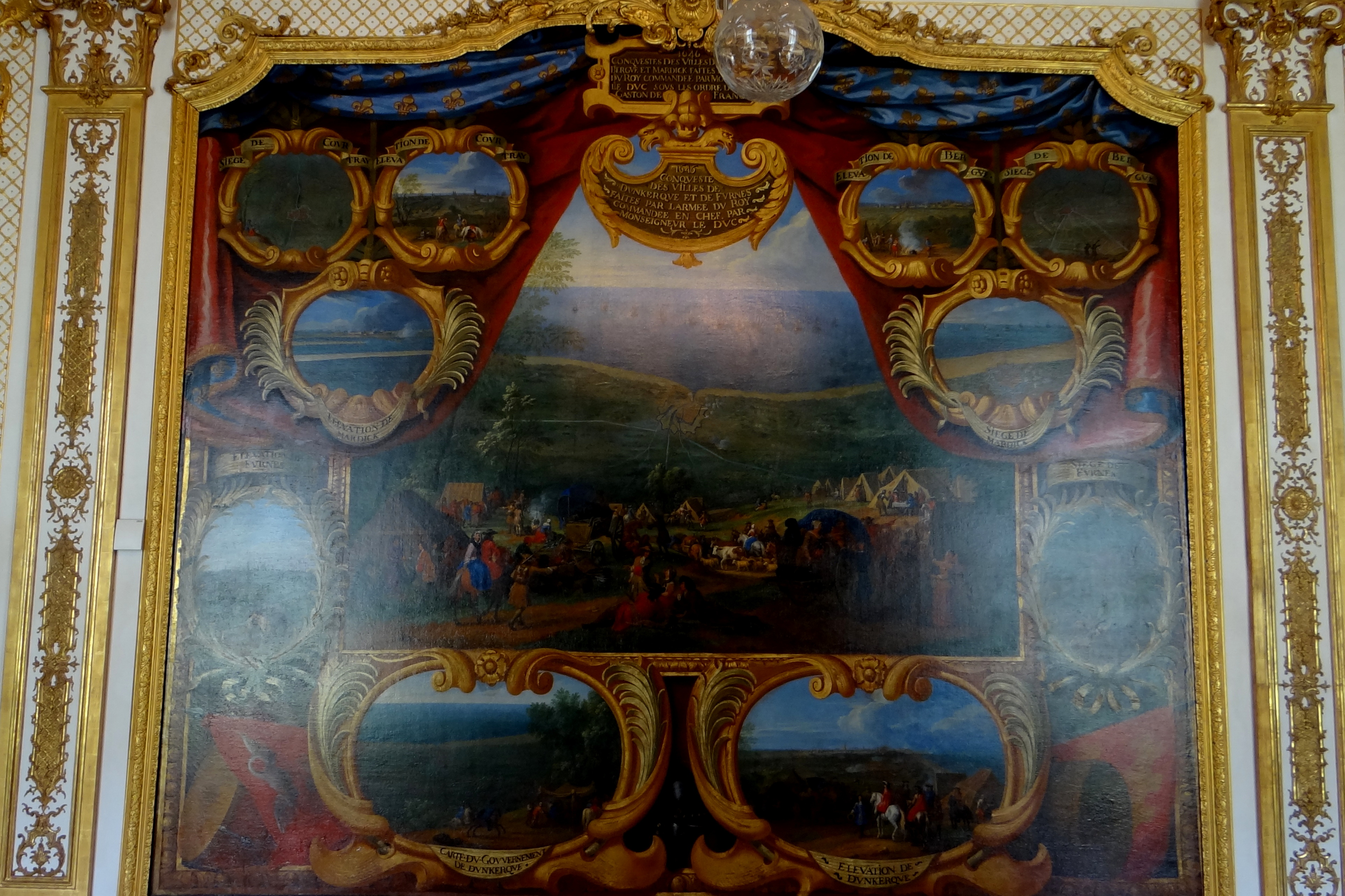 Sauveur Le Conte (1659-1694) - la bataille de Dunkerque en 1646 - Château de Chantilly